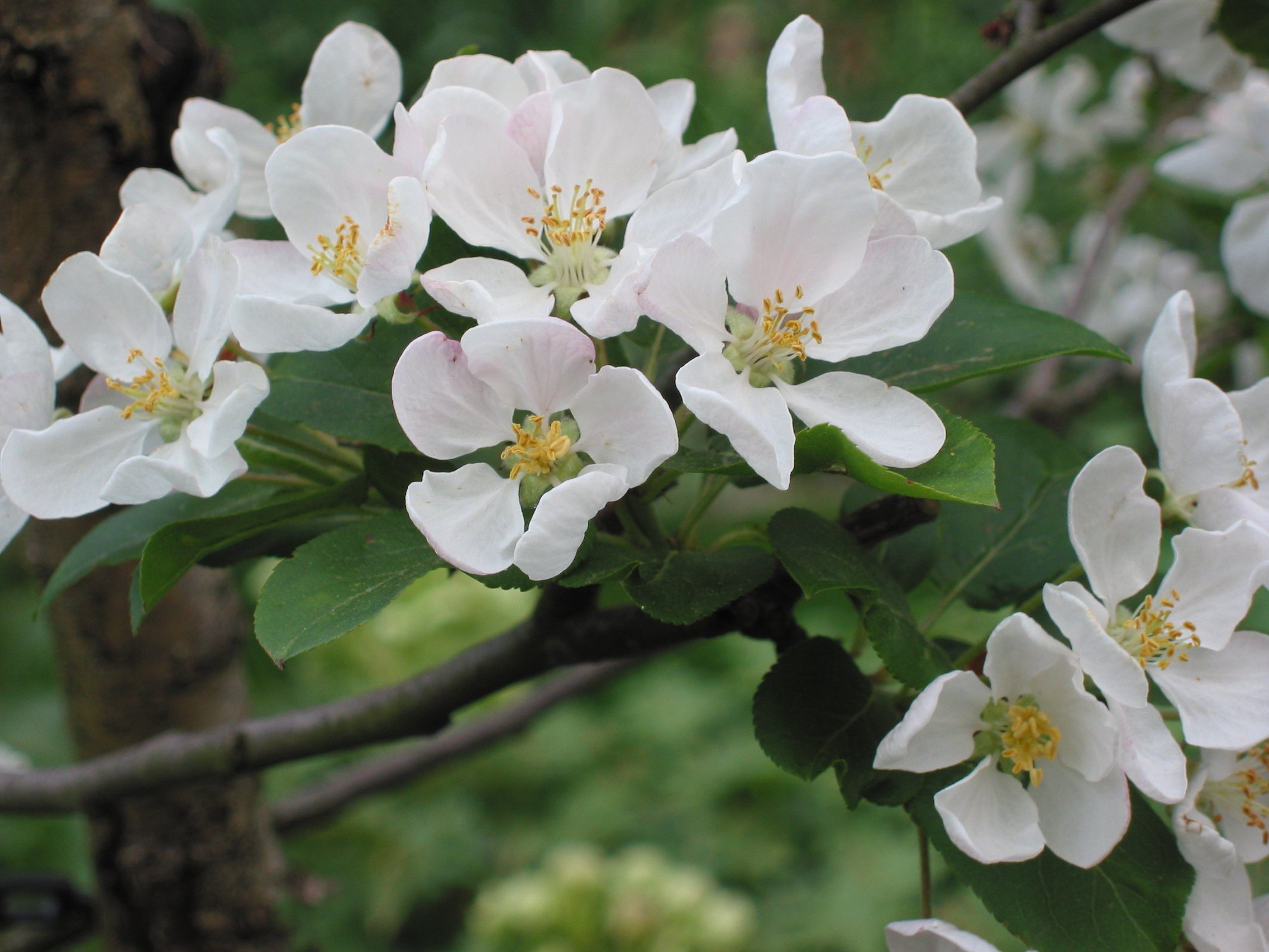 (Sierappel Red Sentinel) Malus x robusta 'Red Sentinel'